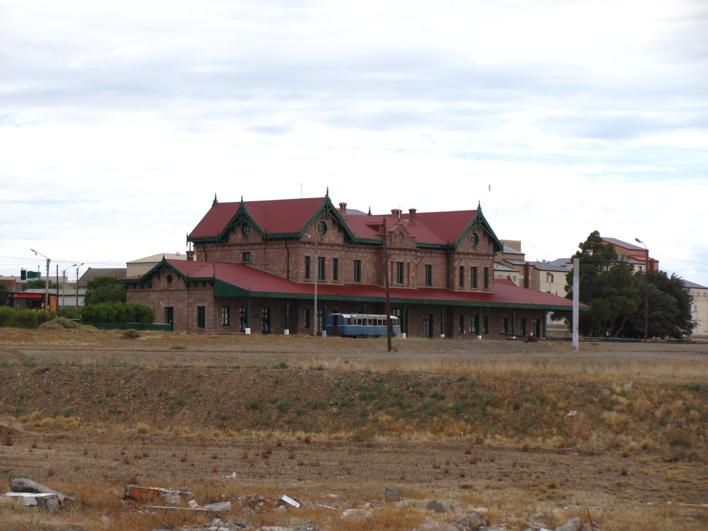 Vista de atrás de la estación de trenes Puerto Deseado